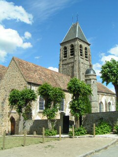 Description: église de Gometz-le-Châtel Source: photo prise par Christophe Jacquet le 27 juin 2004 Licence: Christophe Jacquet, 2004